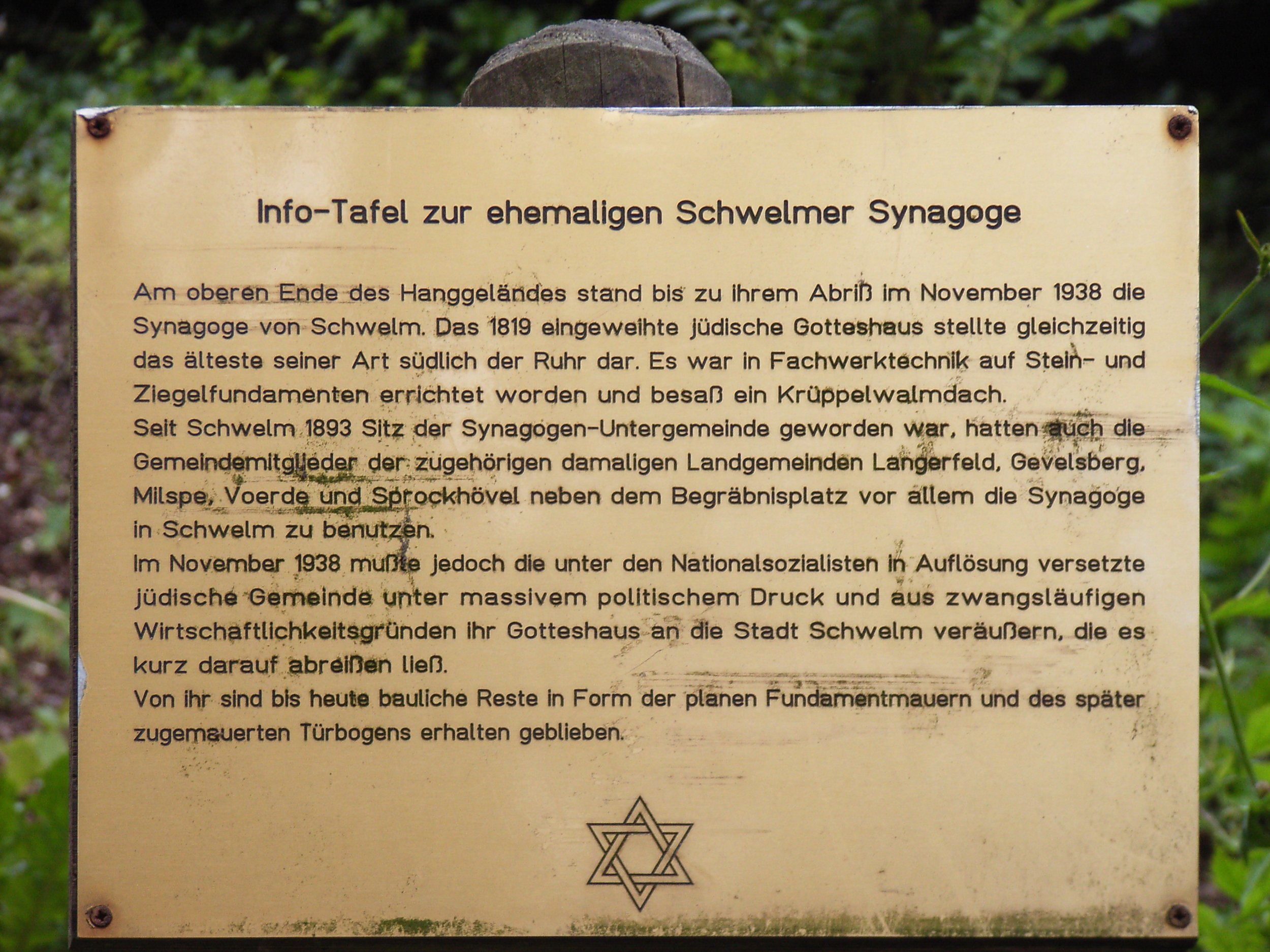 Informationsschild am einstigen Standort der Synagoge an der Fronhofstraße in Schwelm, NRW, Deutschland